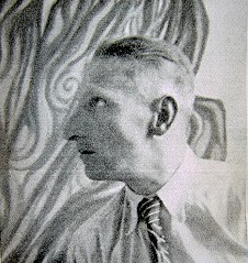 Oskar Pafka (1896-1949), český malíř a grafik